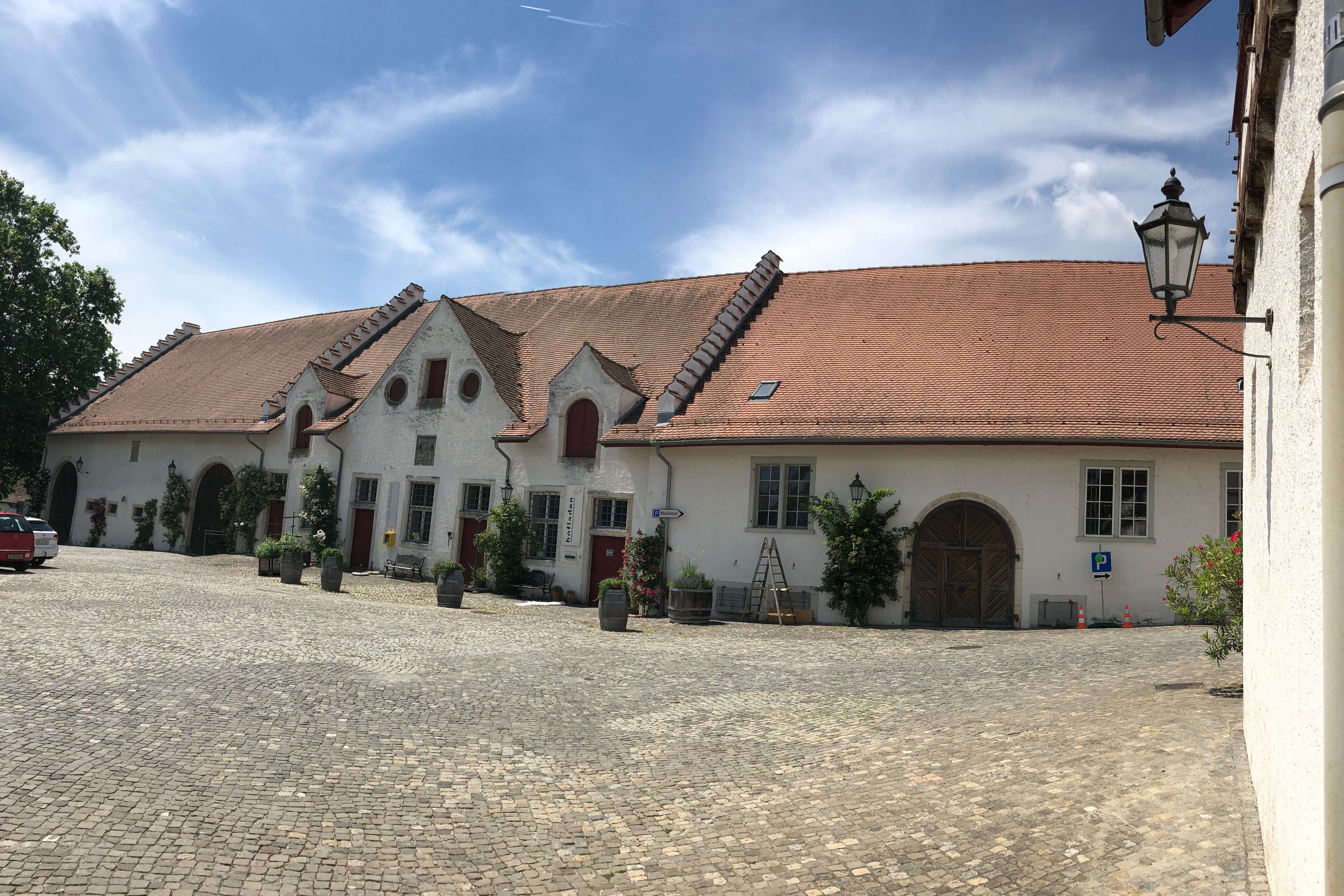 Kloster Rheinau Hofladen